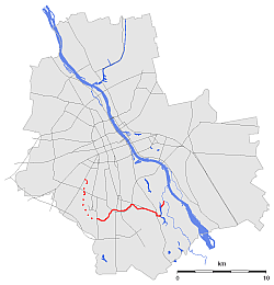 Potok Służewiecki (czerwona linia) na tle konturu Warszawy, razem z Kanałem Sobieskiego jako jego częścią.Mapka wykonana przy pomocy programu GMT 5.1.1